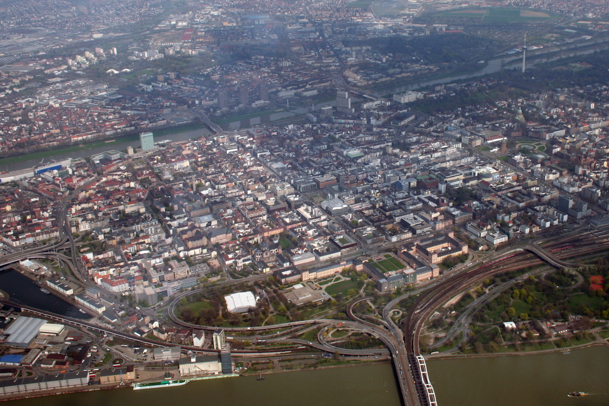 Blick auf die Mannheimer Innenstadt aus einem Segelflieger